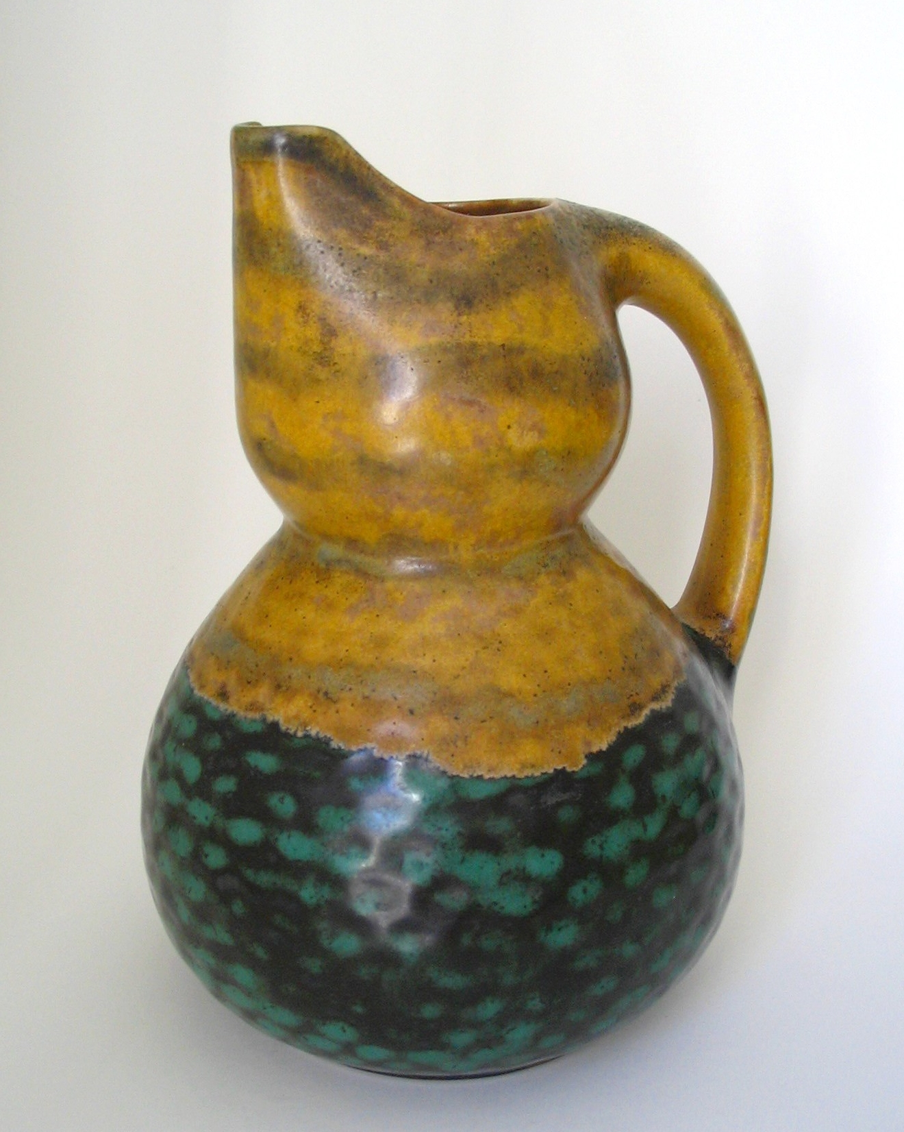 Louis Lourioux (Franzose, 1895-1930): Krug, Steinzeug.